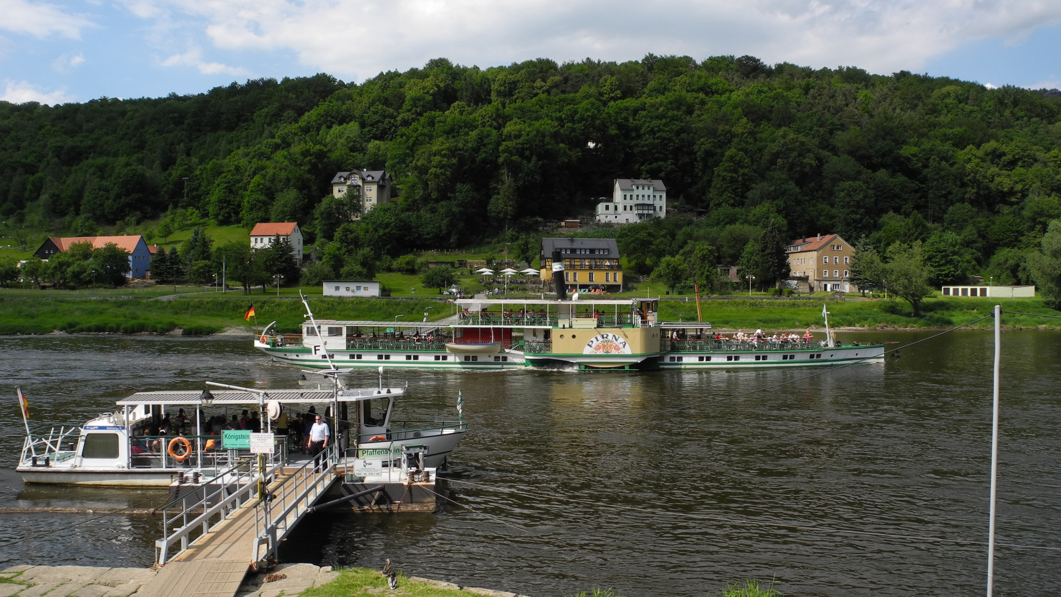 Königstein-Sächsische Schweiz - Elbfähre, Blick auf die Anlegestelle Halbestadt am rechten Elbufer, Durchfahrt des Raddampfers Pirna